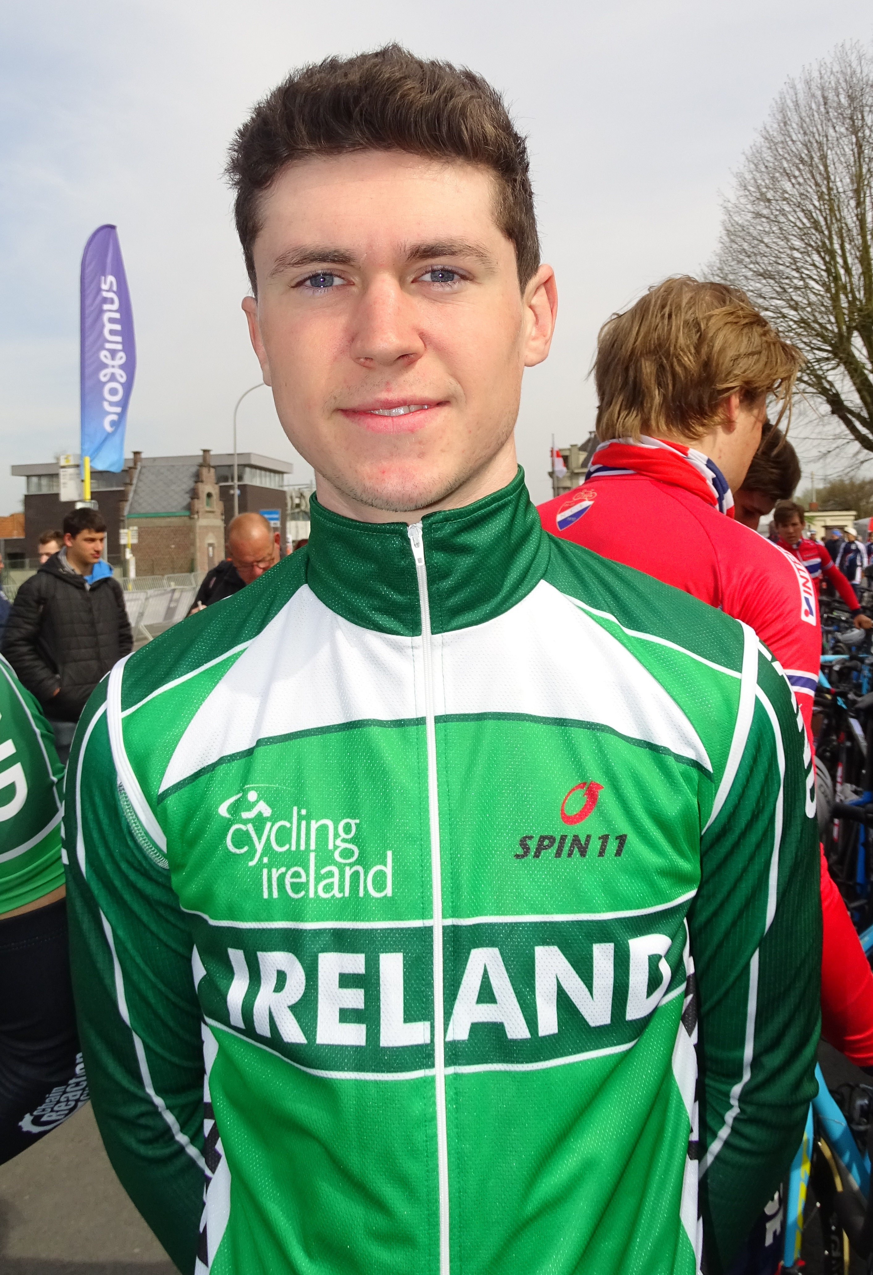 Reportage réalisé le samedi 9 avril à l'occasion du départ et de l'arrivée du Tour des Flandres espoirs 2016 à Audenarde, Belgique.